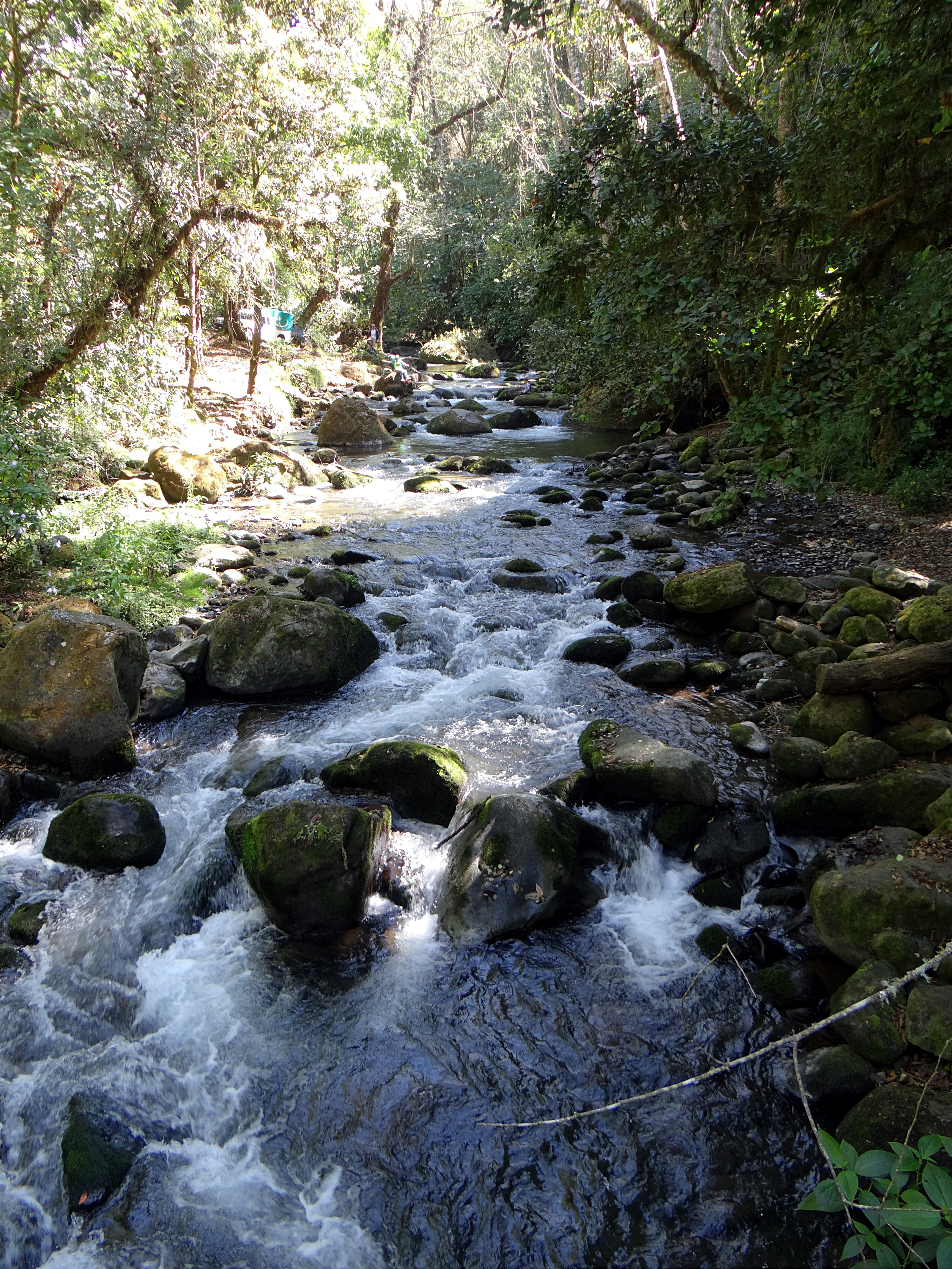 le rio Savegre près de San Gerardo de Dota, Costa Rica.